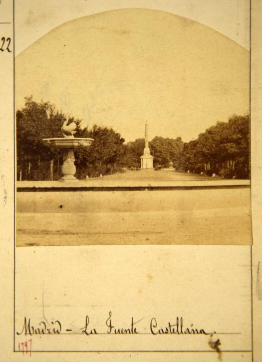 Vista de la fuente del obelisco de la Castellana hacia 1860. En primer plano, la fuente del Cisne. En la actualidad, en el lugar de la fuente del obelisco se encuentra el monumento a Castelar. En el lugar de la fuente del Cisne se encuentra el cruce a distinto nivel entre la calle Eduardo Dato y el paseo de la Castellana